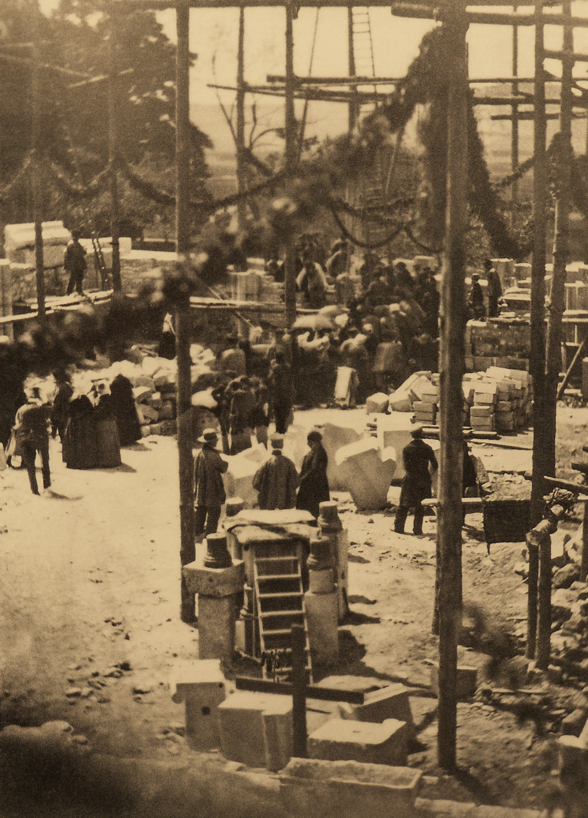 Wallerfangen, Grundsteinlegung zum neogotischen Neubau der Pfarrkirche St. Katharina anstelle der ehemaligen Augustinerklosterkirche im Jahr 1861, (Archiv des Vereins für Heimatforschung Wallerfangen)